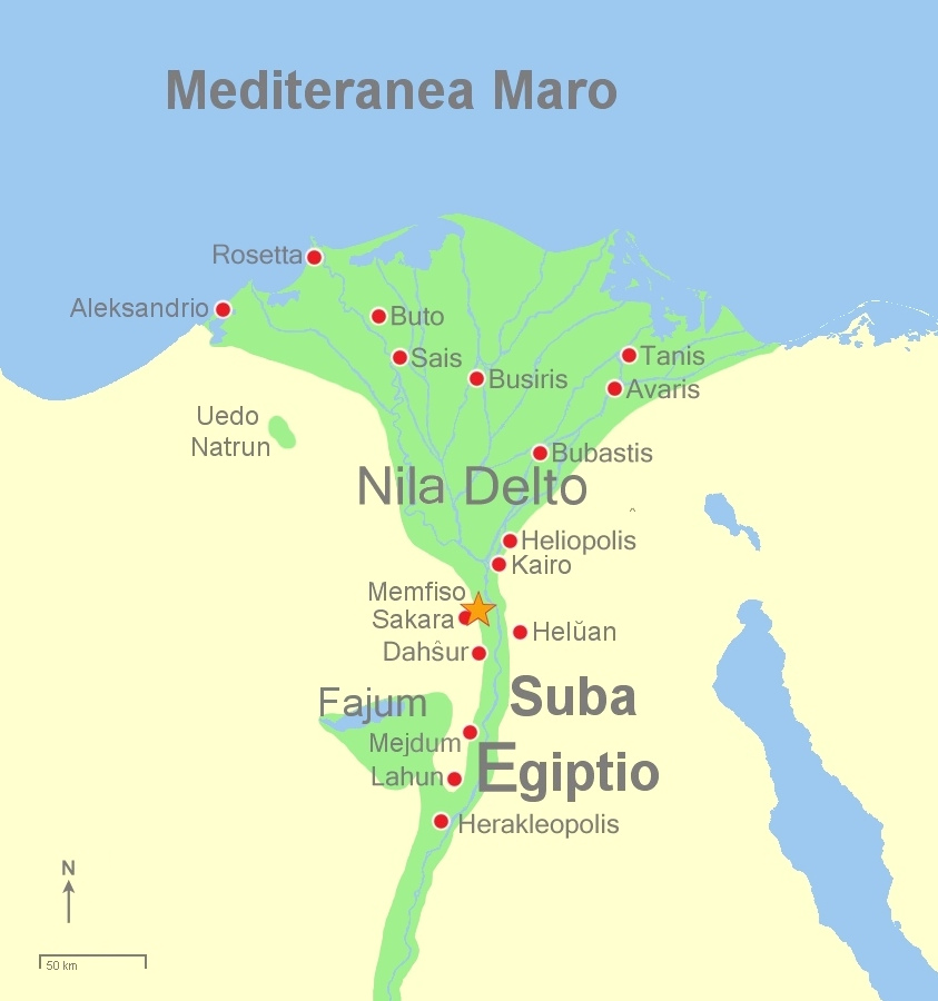 Mapo de antikva Suba Egiptio, priskribo en